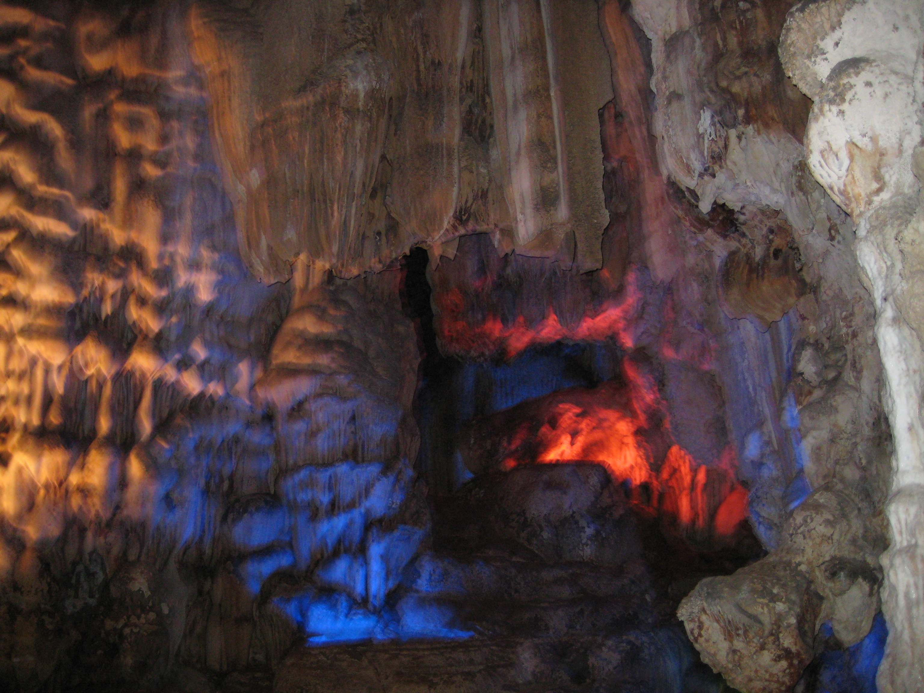 Phong Nha-Ke Bang National Park, Vietnam